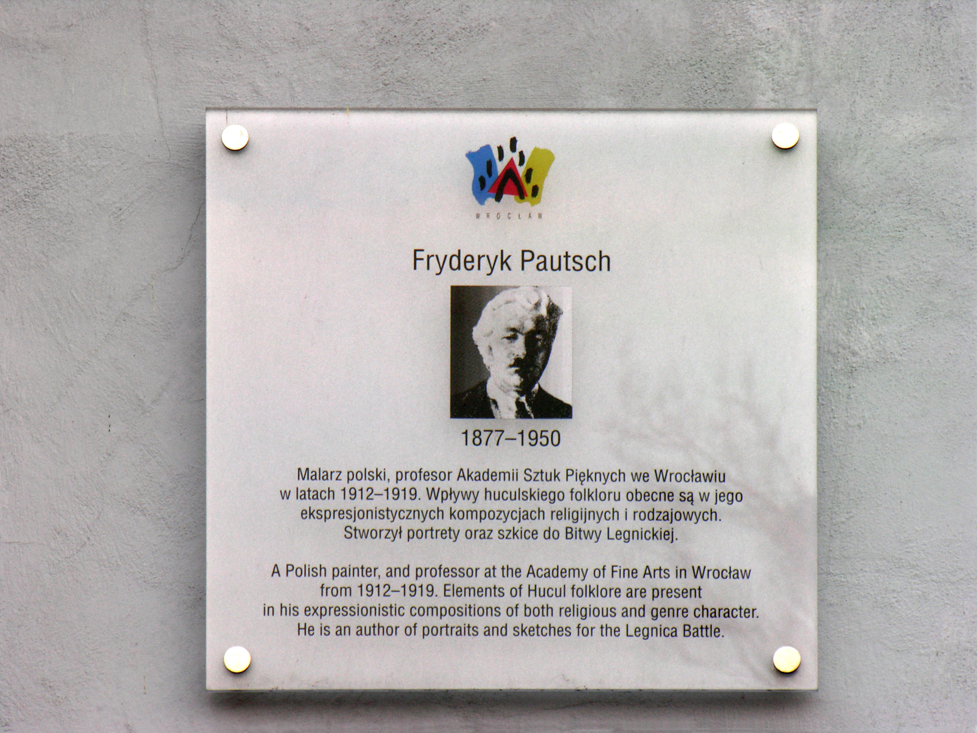 Tablica ku czci malarza Fryderyka Pautscha na budynku Akademii Sztuki Pięknych we Wrocławiu, Plac Polski